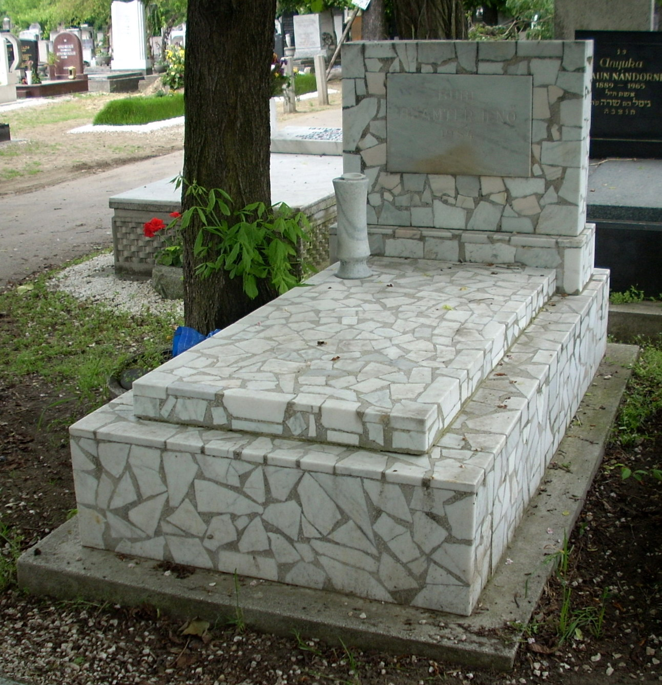 Beamter Bubi dzsesszzenész sírja a Kozma utcai izraelita temetőben (Budapest, X. ker., Kozma utca 6.)